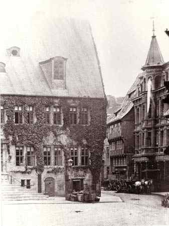 Blick vom Quedlinburger Marktplatz in die Breite Straße, links das Quedlinburger Rathaus, in der Bildmitte das Haus Breite Straße 49